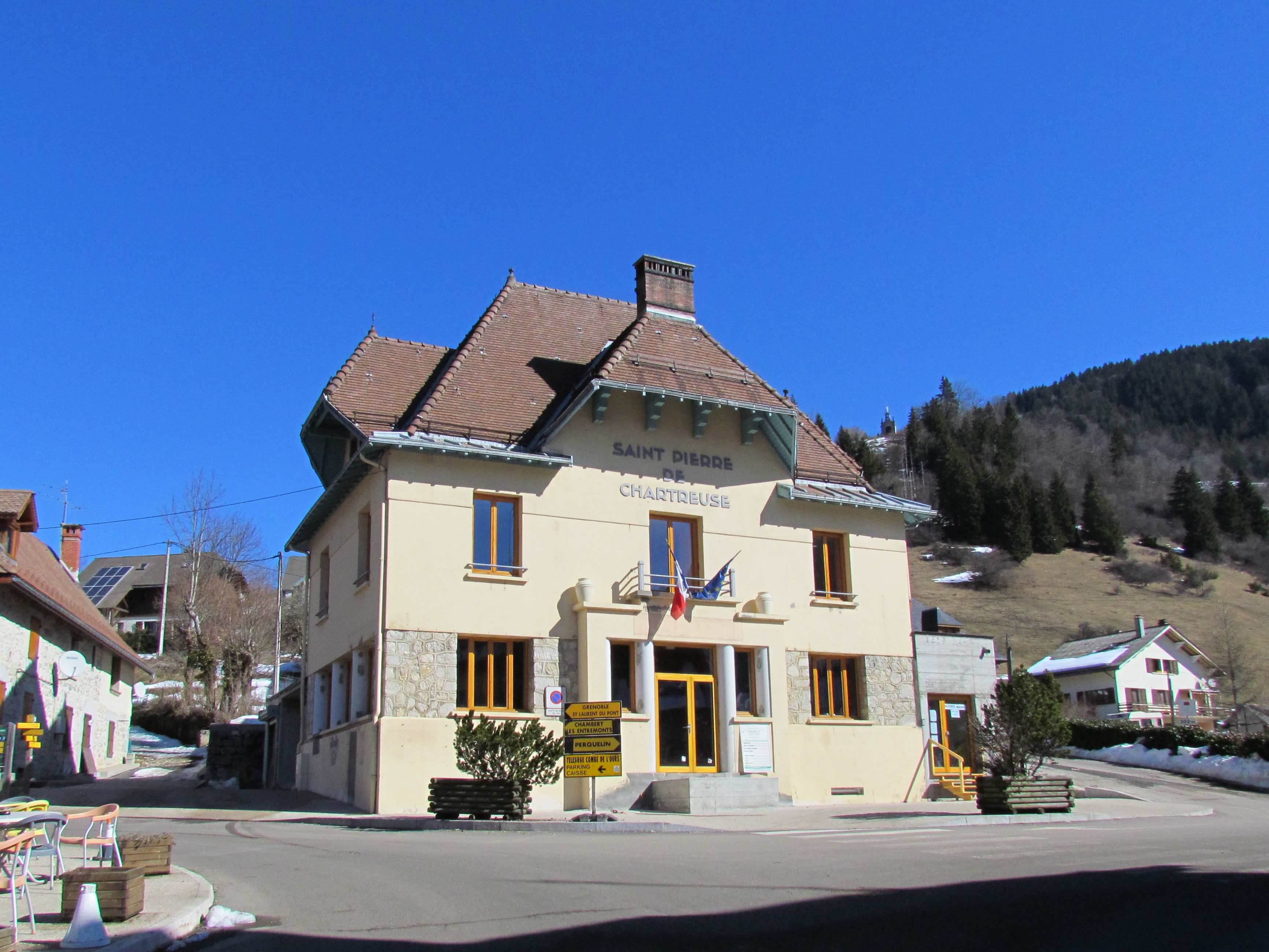 En 2012, date de prise de la photo, le bâtiment était occupé par la Poste. En 2018, il est occupé par la poste et la mairie.